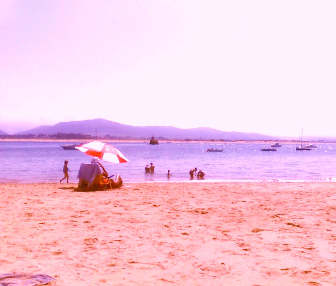 Playa de los Bikinis con la Isla de la Horadada y el Puntal